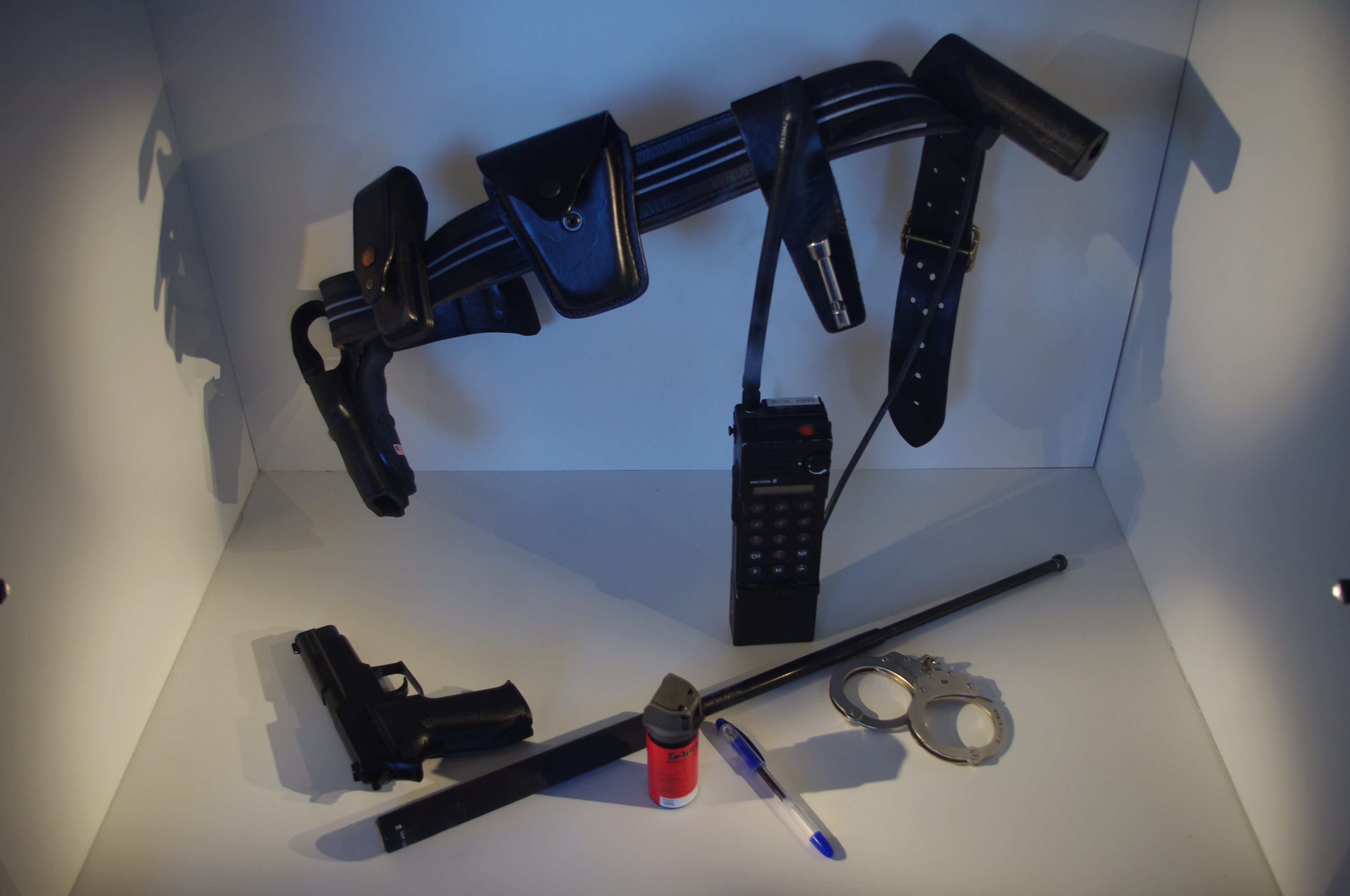 Police equipment